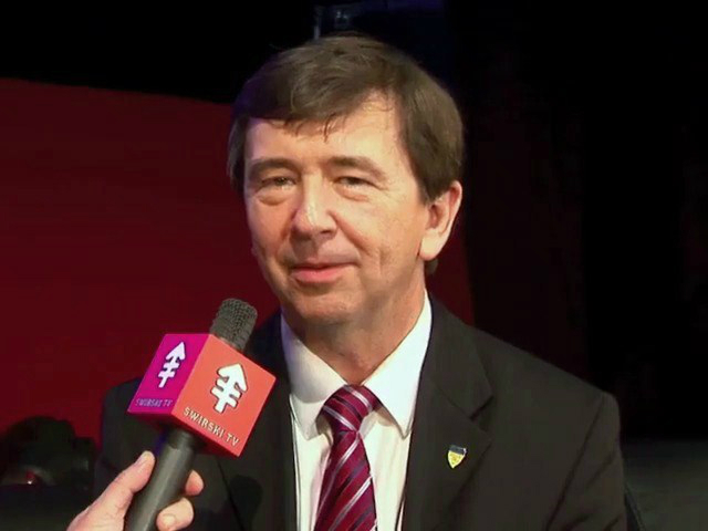 Prof. Wiesław Binienda, polsko-amerykański przedstawiciel nauk technicznych.